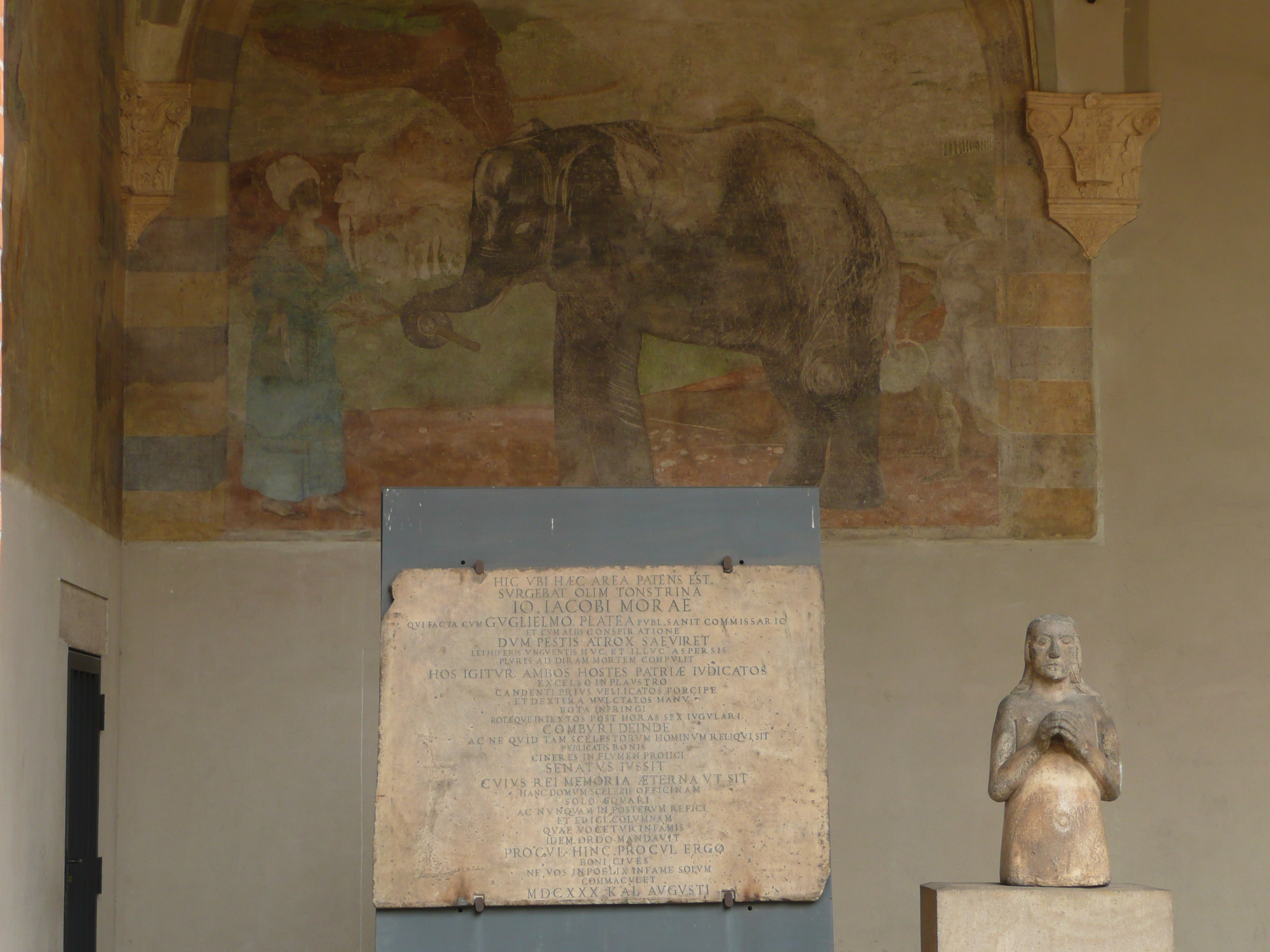 Milano - Castello Sforzesco - Affresco dell'elefante